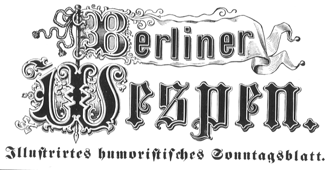 Logo der Zeitschrift Berliner Wespen